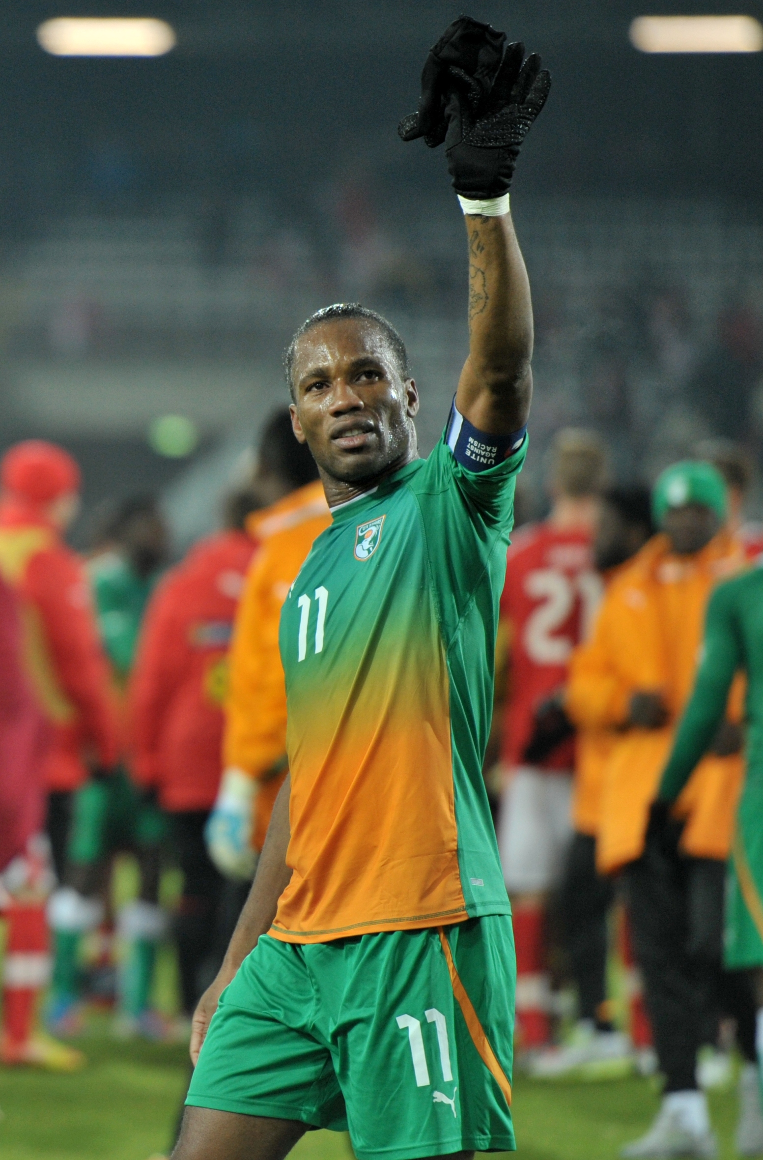 ÖFB freundschaftliches Länderspiel - Österreich vs Elfenbeinküste am 14. November 2012 The making of this work was supported by Wikimedia Austria. For other files made with the support of Wikimedia Austria, please see the category Supported by Wikimedia Österreich. Elfenbeinküste Nr. 11: Didier Drogba